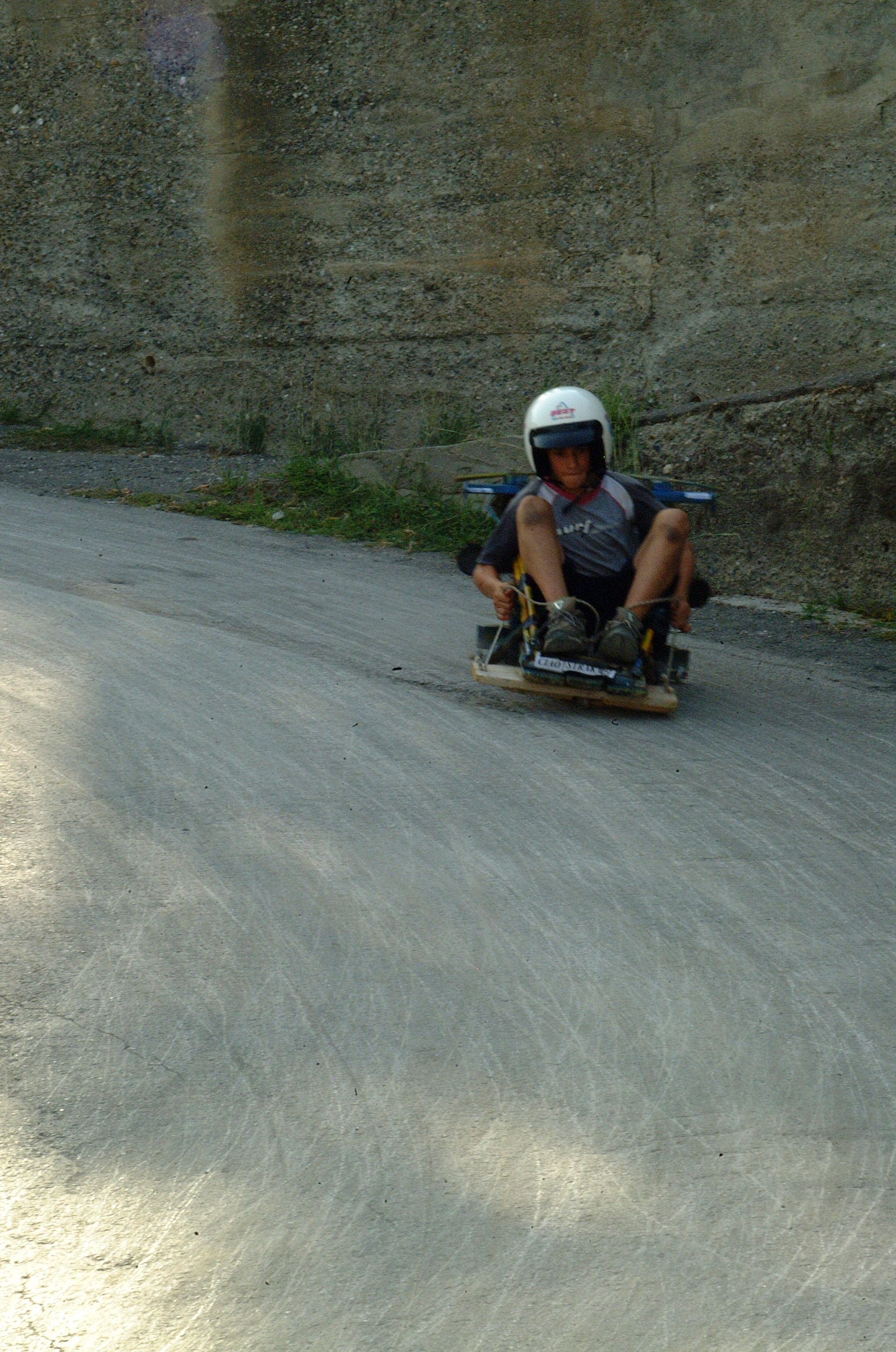 corridore torneo dei carretti